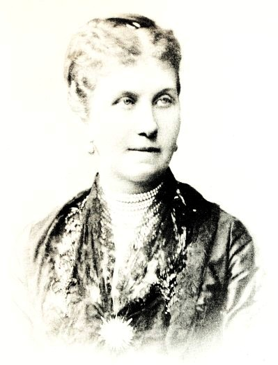 Foto der Salonniere Marie Radziwill